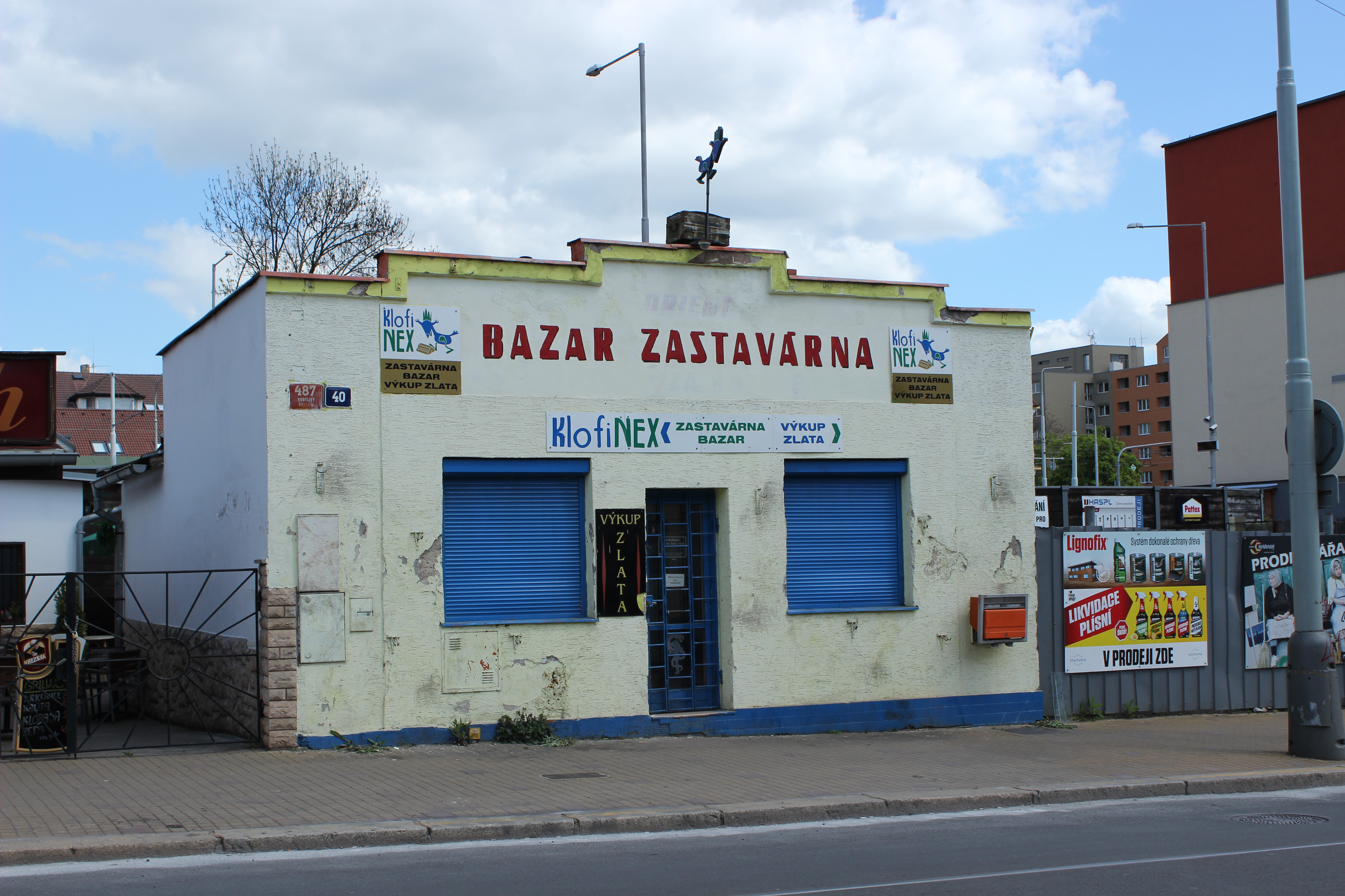 Někdejší modlitebna Farního sboru Českobratrské církve evangelické v Praze 8 - Kobylisích.